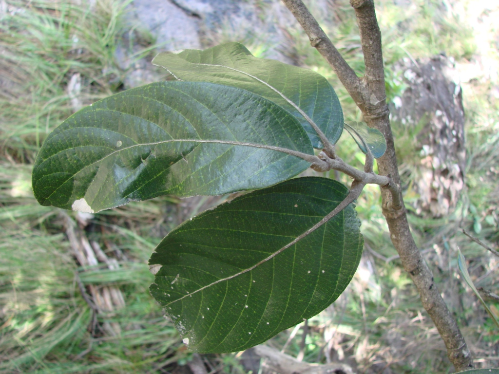 Licania sclerophylla - CHRYSOBALANACEAE Parque Nacional da Chapada dos Veadeiros - Cavalcante - Goiás - Brasil.